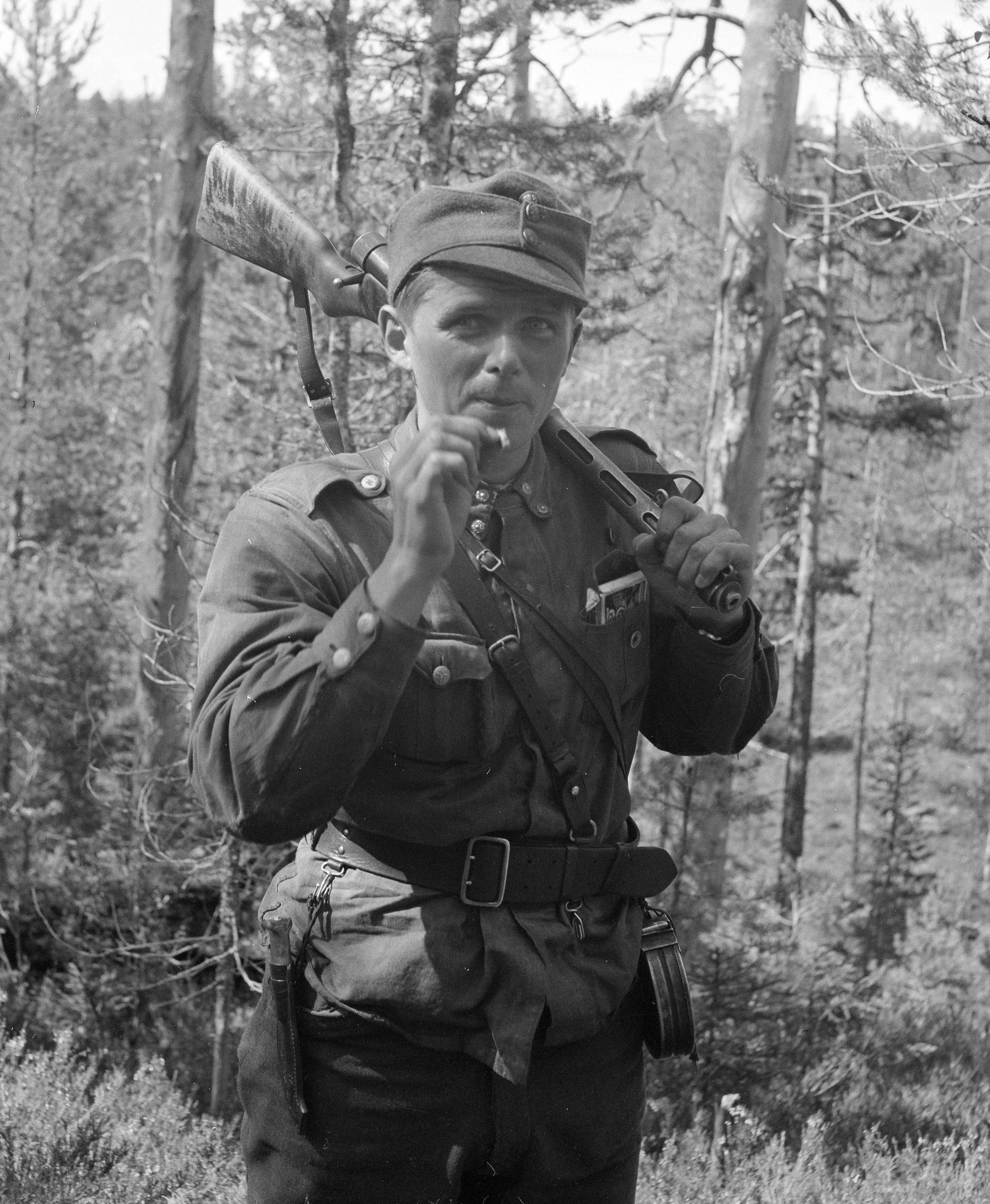 Olavi Alakulppi